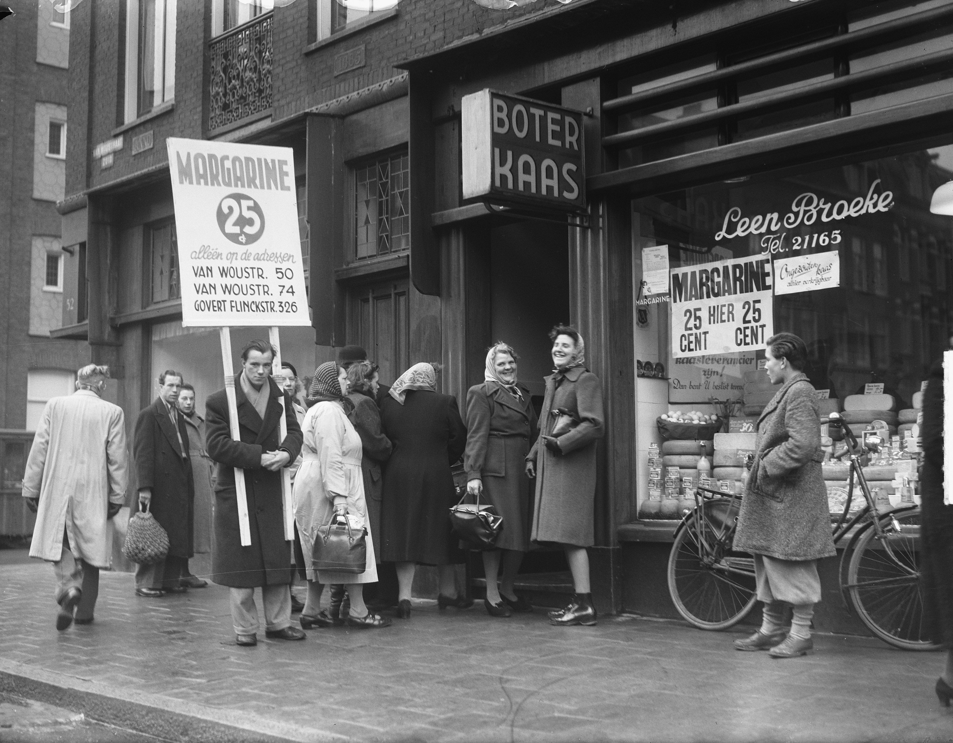 Collectie / Archief : Fotocollectie Anefo Reportage / Serie : [ onbekend ] Beschrijving : Margarine-overleg op prijsverlaging Datum : 31 januari 1950 Fotograaf : Nijs, Jac. de / Anefo Auteursrechthebbende : Nationaal Archief Materiaalsoort : Glasnegatief Nummer archiefinventaris : bekijk toegang 2.24.01.09 Bestanddeelnummer : 903-8128